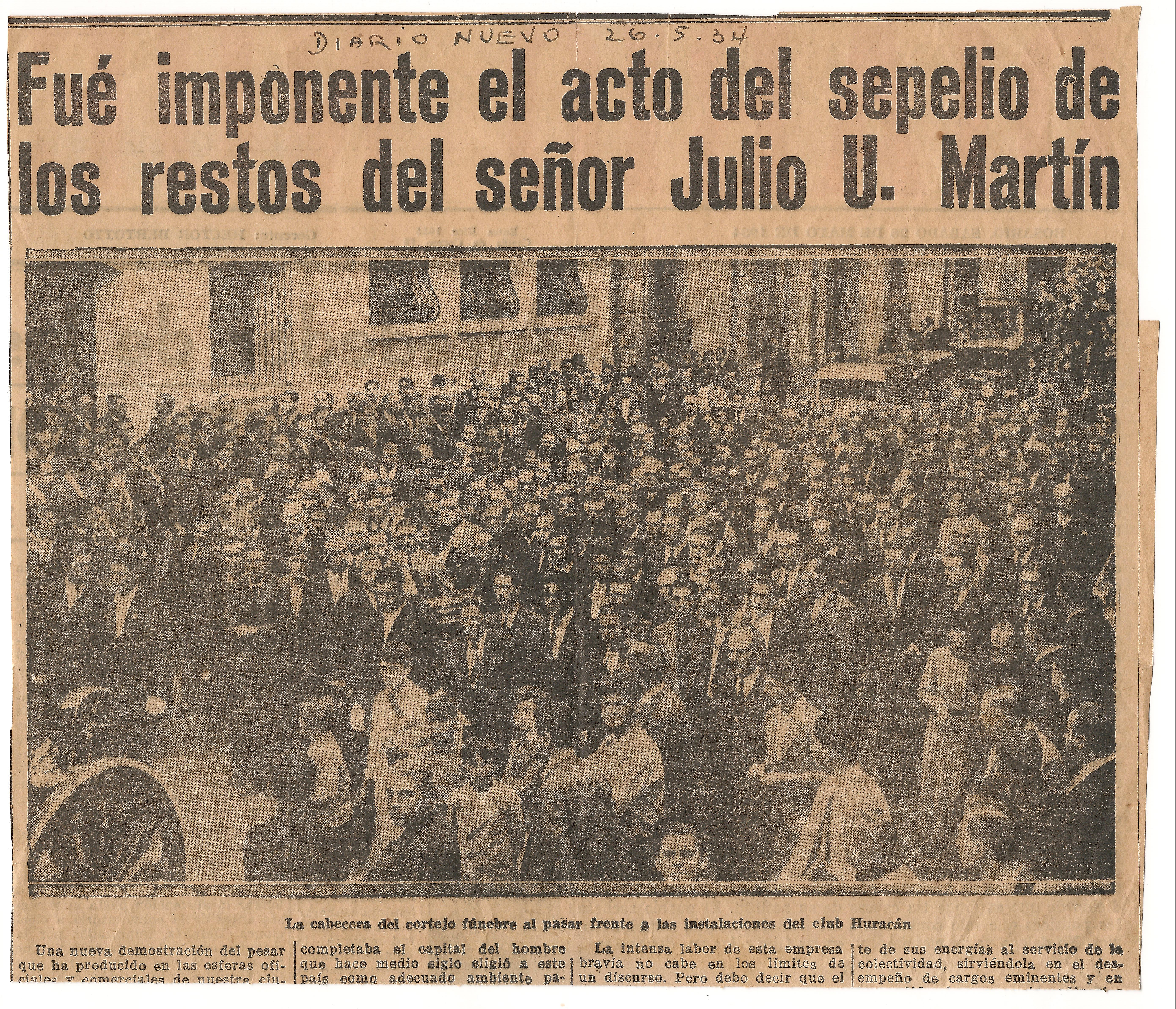 Julio Ulises Martín, pionero de Puerto Mineral, Provincia de Misiones. Fallecimiento publicado en el Diario Nuevo, de Rosario, Provincia de Santa Fe. Diario Nuevo (desaparecido). Sábado 26 de mayo de 1934. Fuenteː Periodista Horacio Cambeiro.